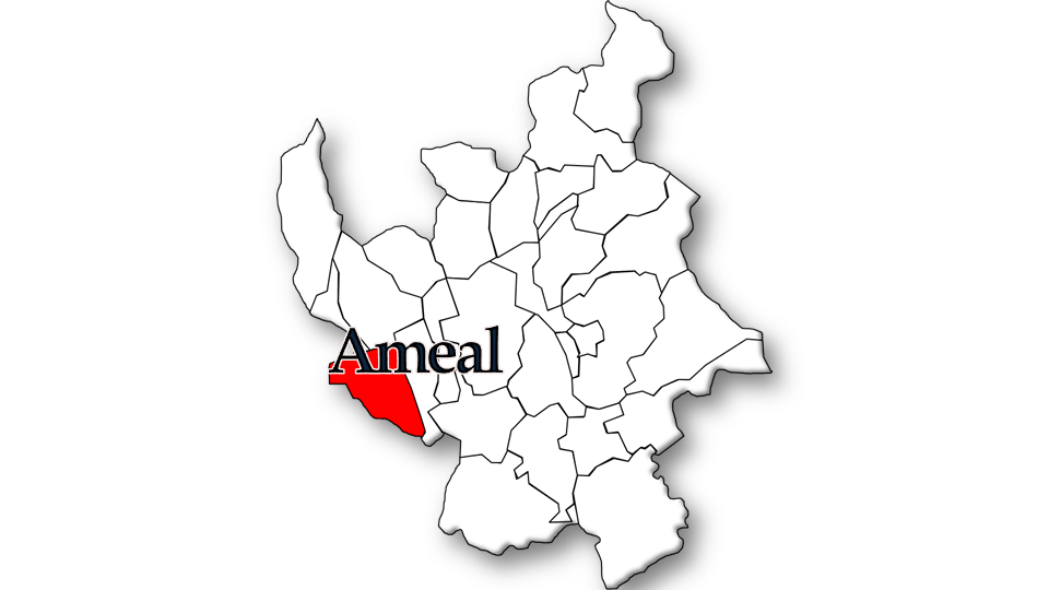 População